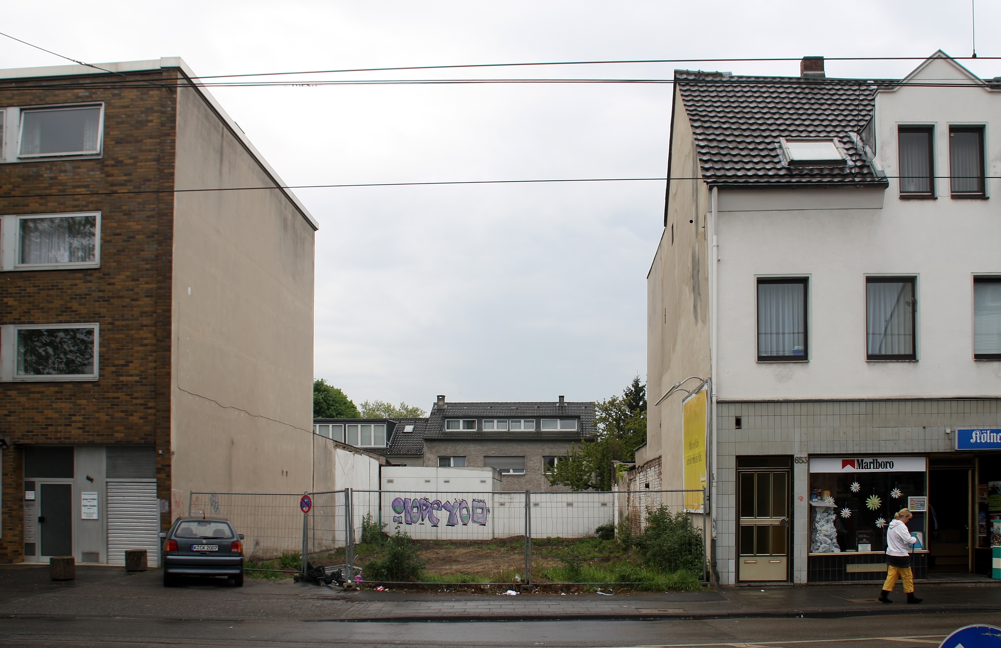 Baulücke (Hochbau) auf der Neusser Straße 651 in Köln-Weidenpesch.